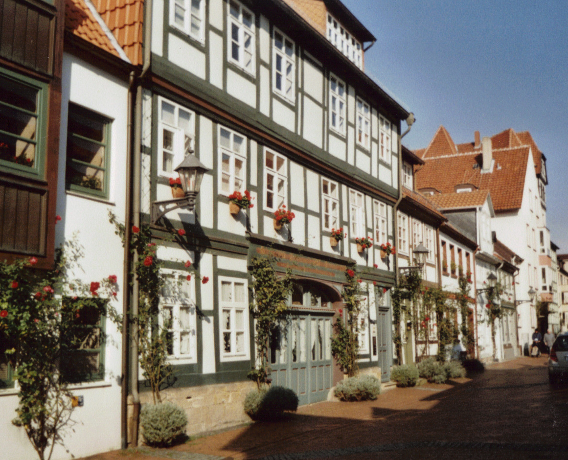 Ackerbürgerhaus in Hildesheim, Knollenstraße.